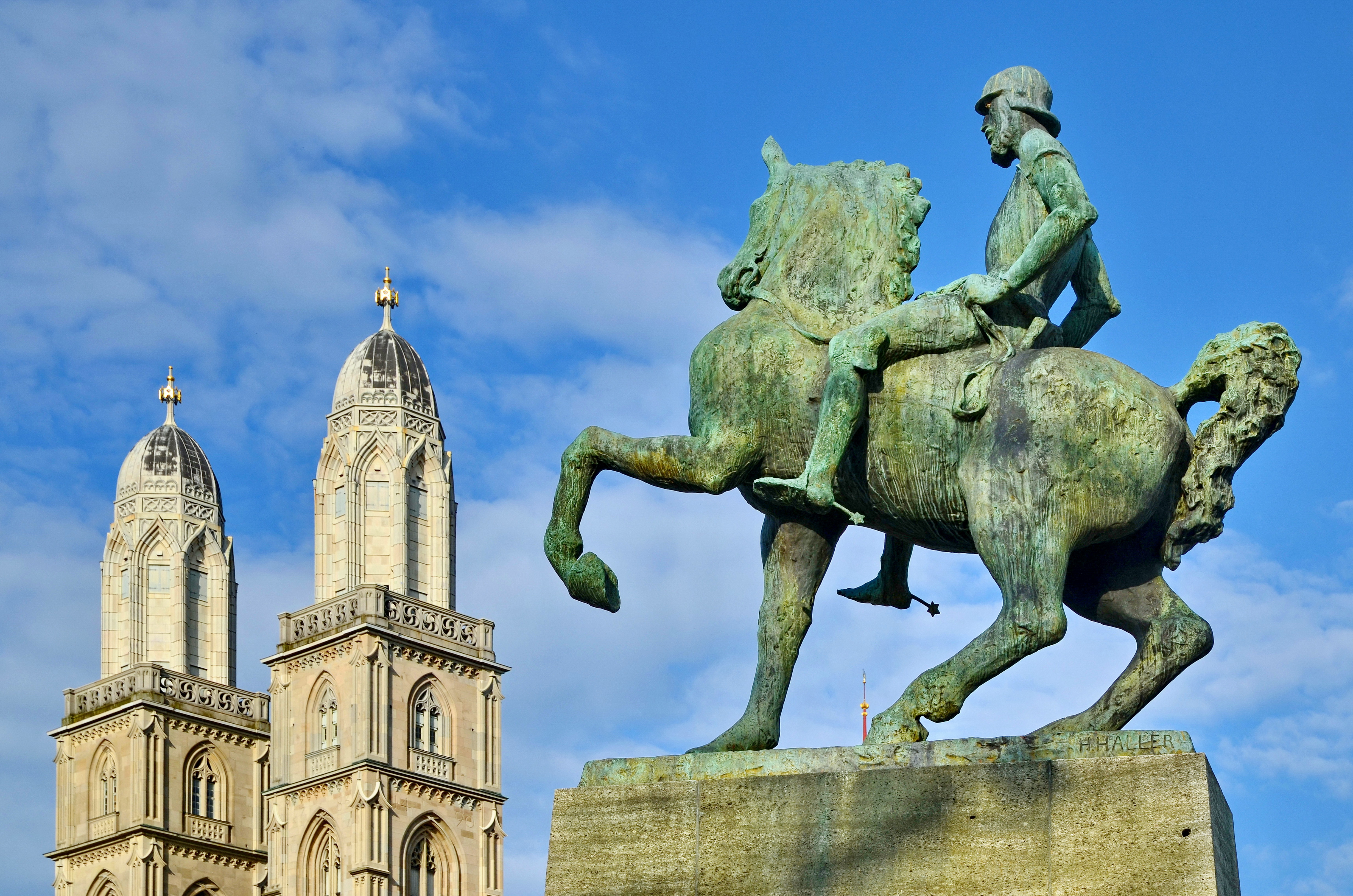 Grossmünster and Hans Waldmann Monument in Zürich as seen from Münsterhof (Zürich)